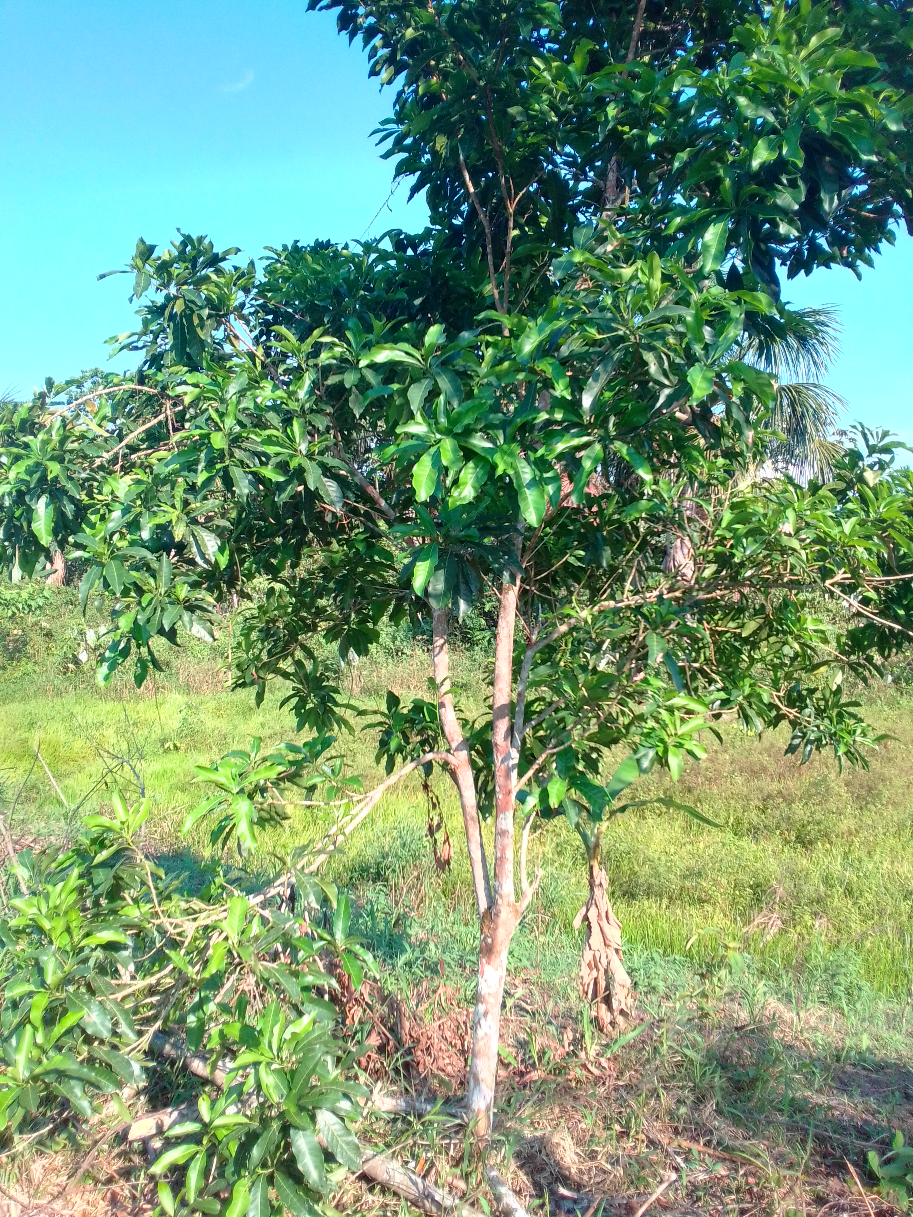 Árbol de Caimito en la Amazonía de Iquitos